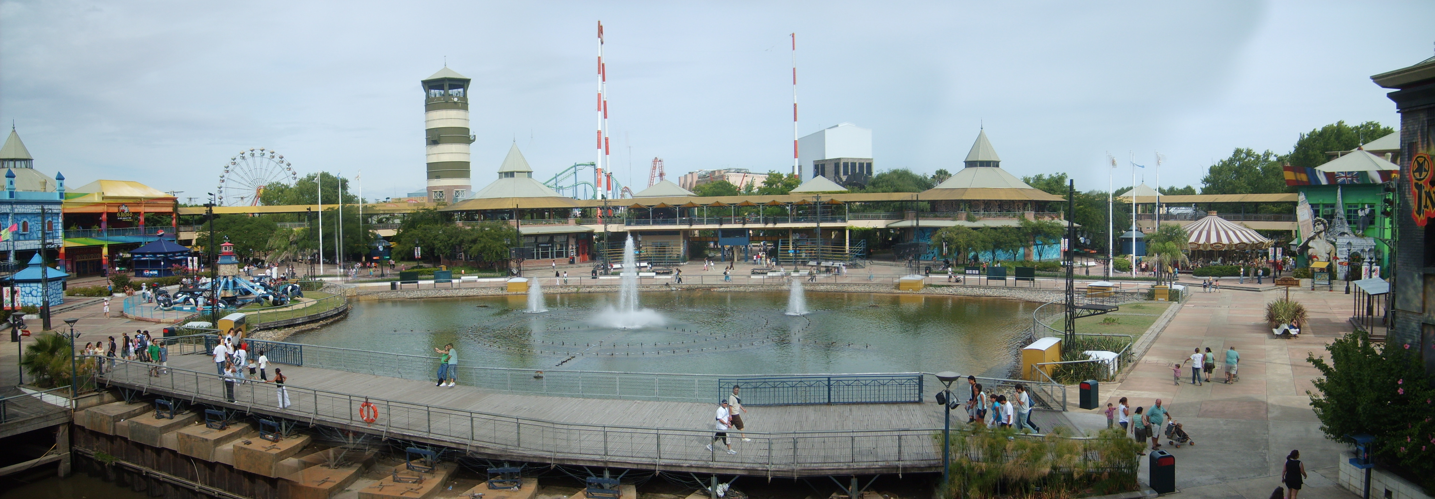 Fotografia en "Panoramica" en 6 (seis!) fotos, notese la familia que esta cerca de la escalera (donde esta en el cesto de basura) se repite dos veces, la deje a proposito ya que cada foto la tome cada 20 segundos (para que no salga movida). Editada en Corel PhotoPaint X3.